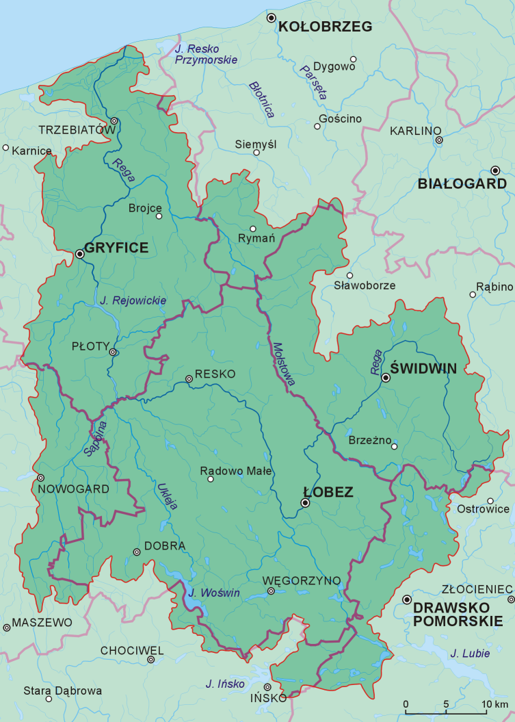 Dorzecze Regi z podziałem administracyjnym (powiaty) oraz miastami powiatowymi, pozostałymi miastami i wsiami gminnymi